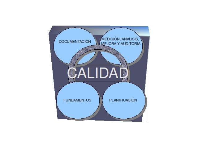 "La calidad no se logra por accidente, es el resultado de un esfuerzo inteligente". El liderazgo en calidad requiere que los bienes, servicios y procesos internos satisfagan a los clientes. la planificación de la calidad es el proceso que asegura que estos bienes, servicios y procesos internos cumplan con las expectativas de los clientes. Al implementar un sistema de gestión de calidad es complementar y proporcionar un enfoque participativo y estructurado para planificar nuevos proyectos, servicios y procesos para así entrar a la competencia de nuevos mercados. Las características de un producto o servicios determinan el nivel de satisfacción del cliente las cuales son debidamente calificados o evaluados con el fin de dar a conocer dicho producto y así el consumo sea de forma efectiva y exitosa. La satisfacción de las necesidades y expectativas del cliente construye el elemento mas importante de la gestión de calidad y la base del éxito de una compañía.